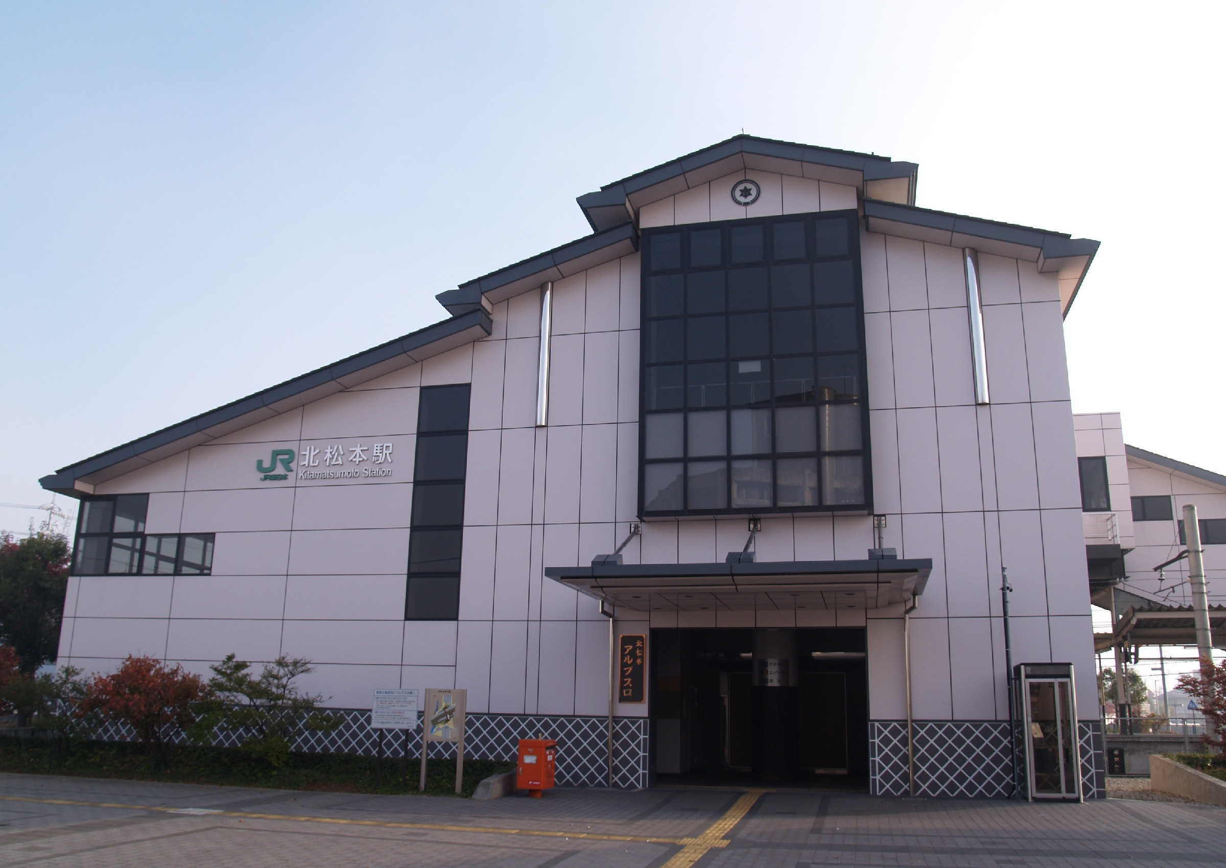 北松本駅アルプス口